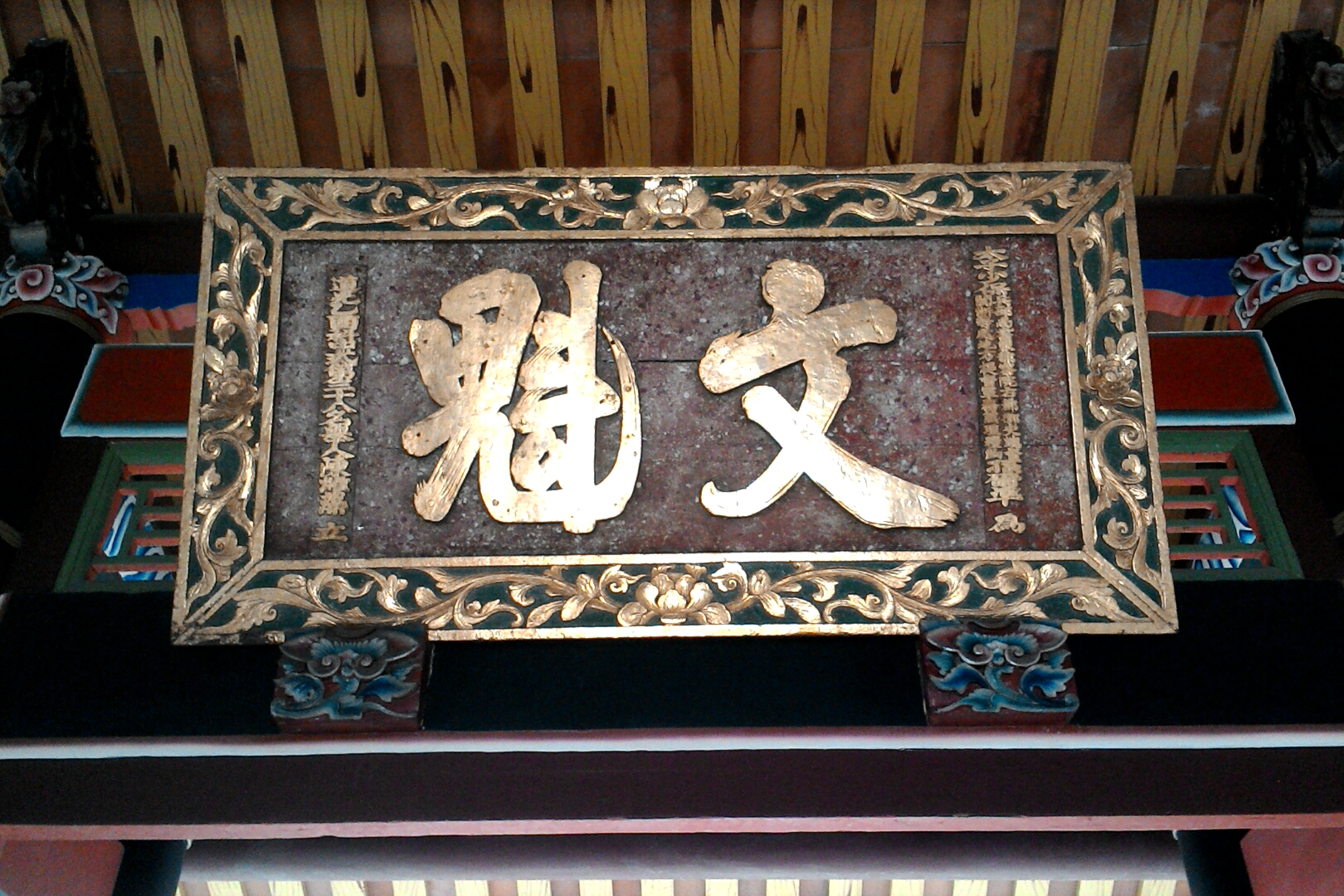 陳悅記祖宅中孫爾準所贈匾額,台北市大同區蘭州次分區老師里